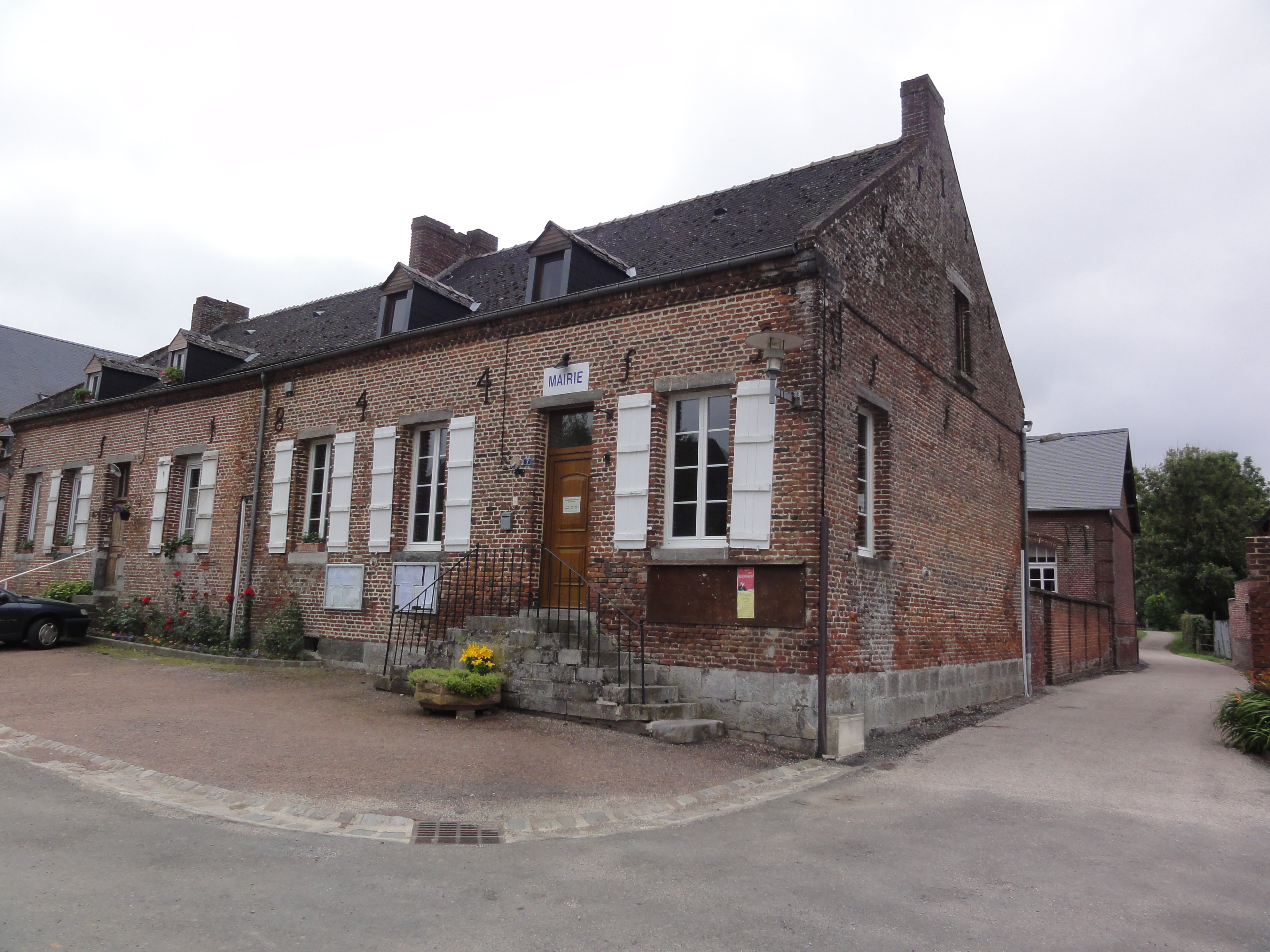 Sorbais (Aisne) mairie (à droite: passage de l'Axe vert de la Thiérache)